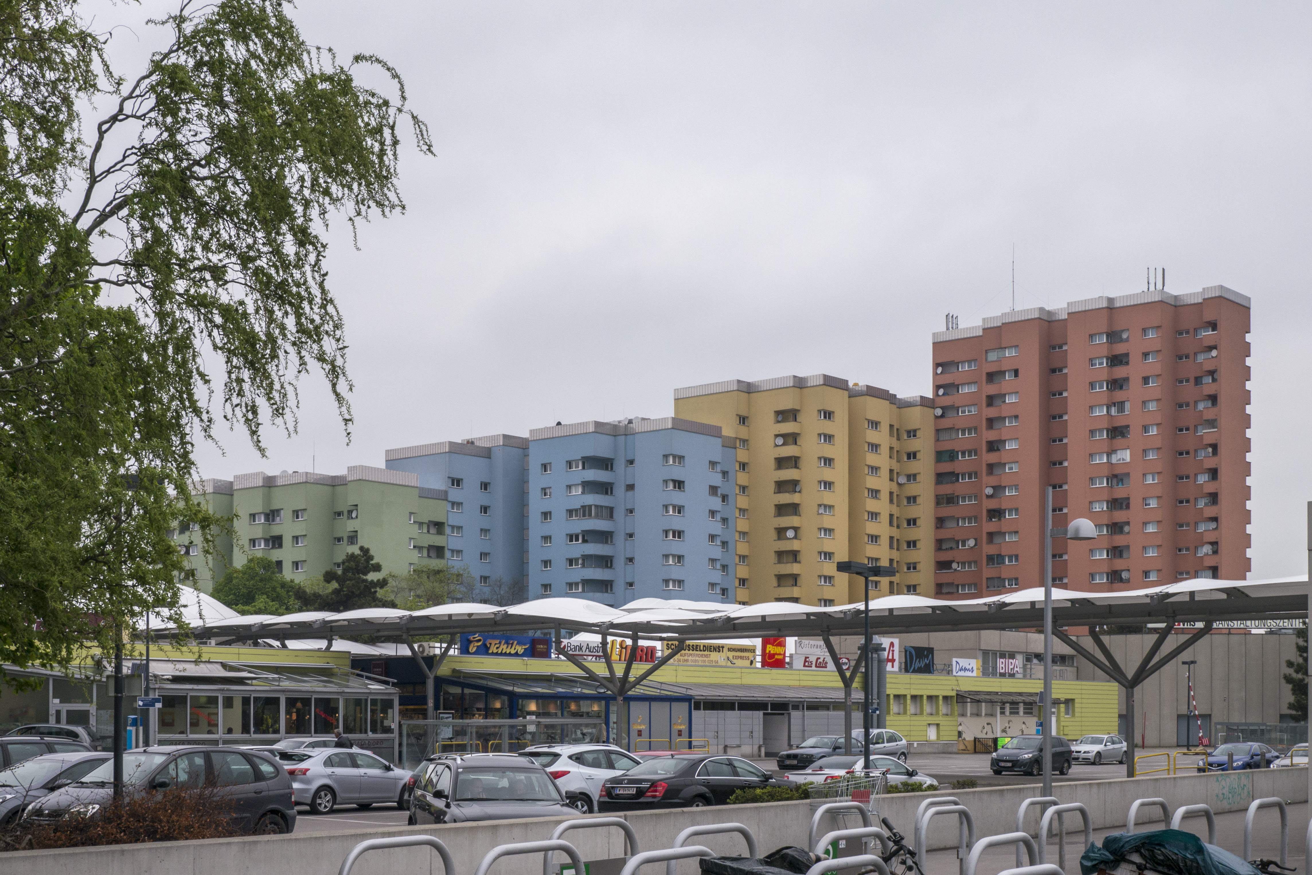 Großfeldsiedlung Pastorstraße/Dopschstraße